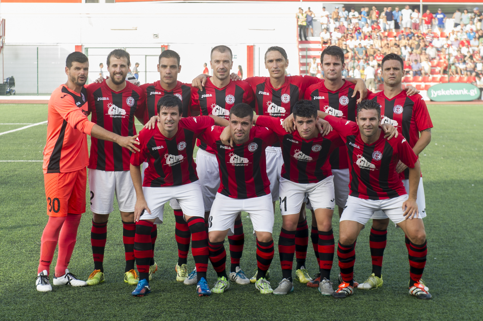 LINCOLN - UEFA - 21.07.2015 - 10